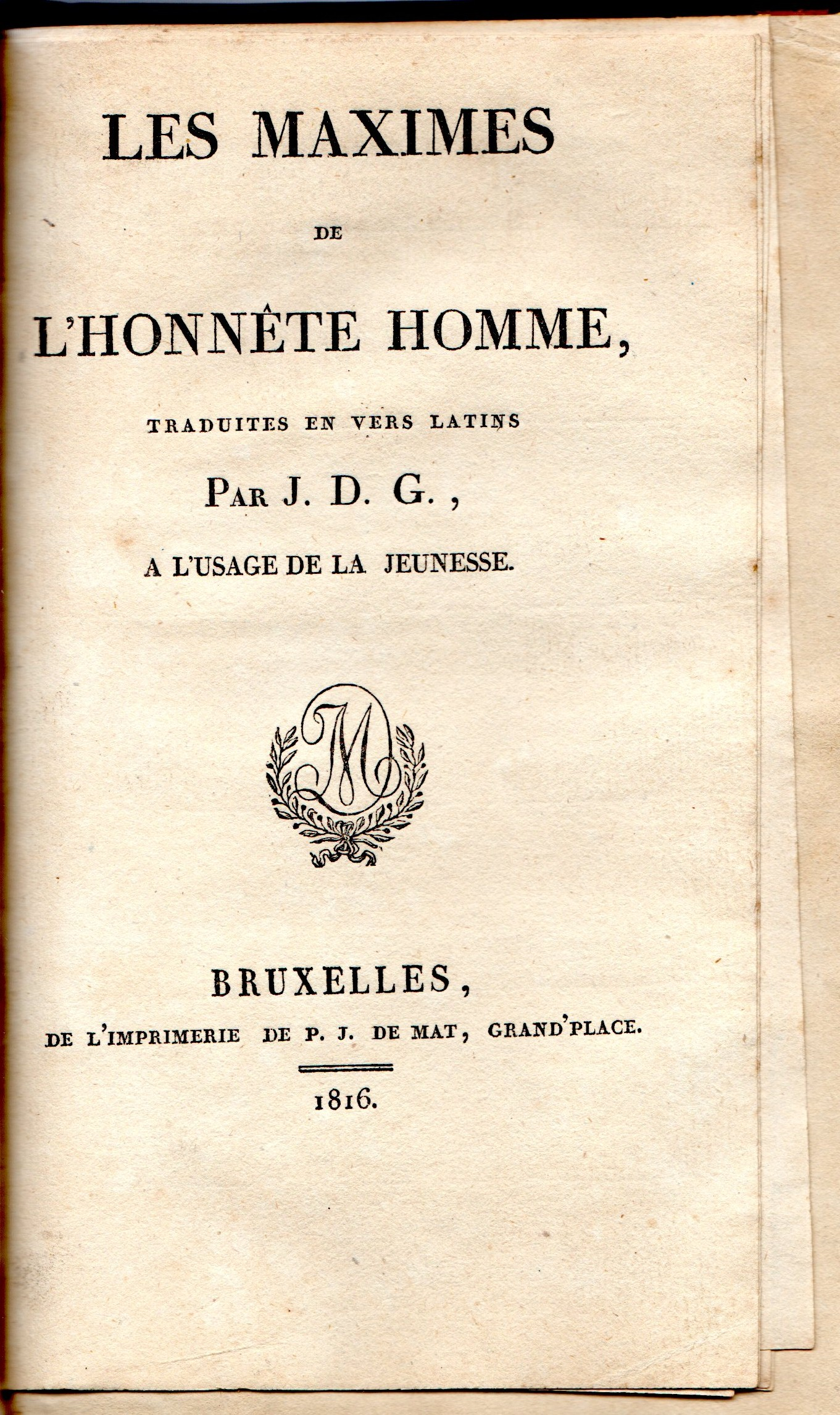 Livre de Jacques-Joseph Deglimes, "Les maximes de l'honnête homme" Bruxelles, 1816.